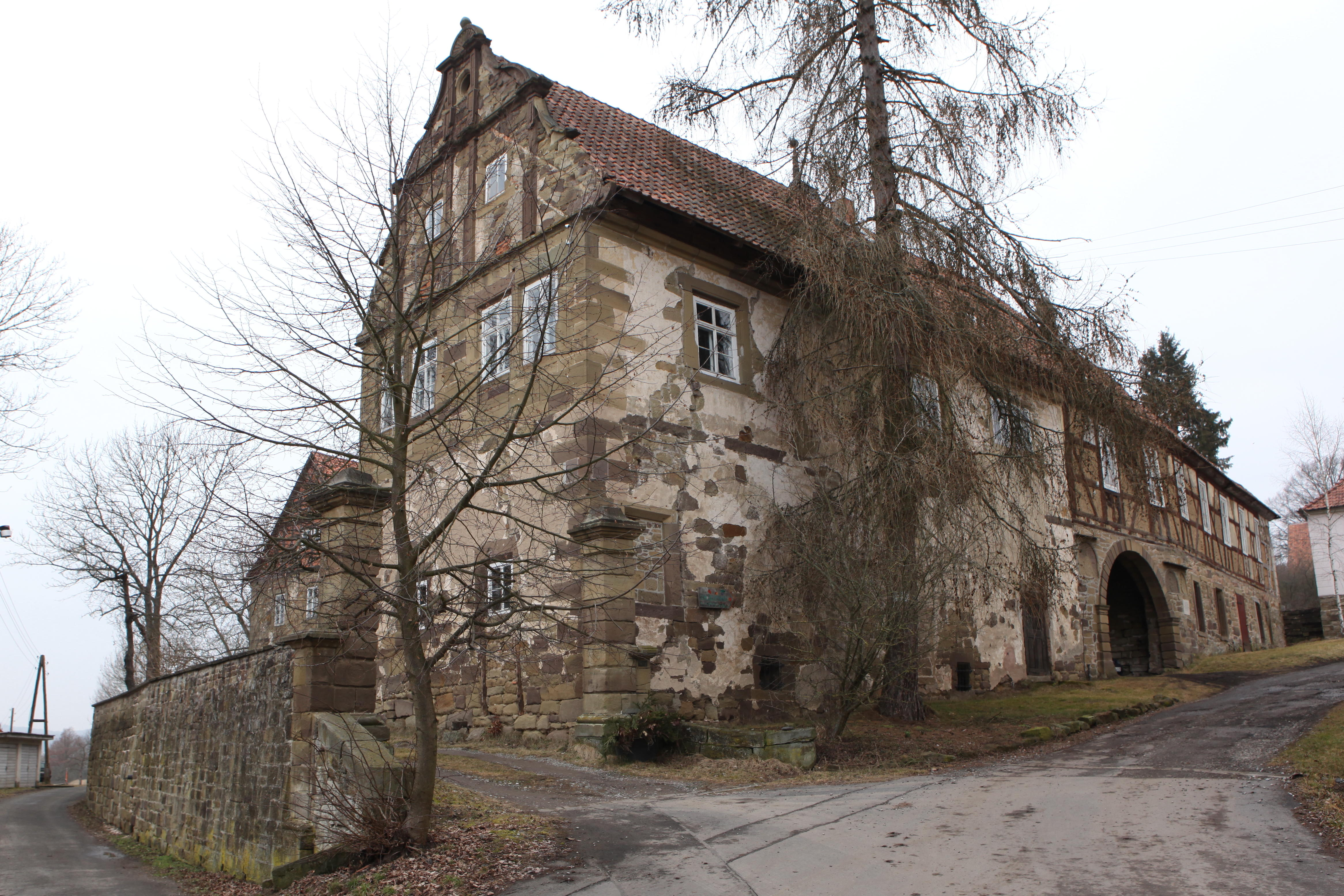 Schloss Bedheim, OT von Gleichamberg, Landkreis Hildburghausen